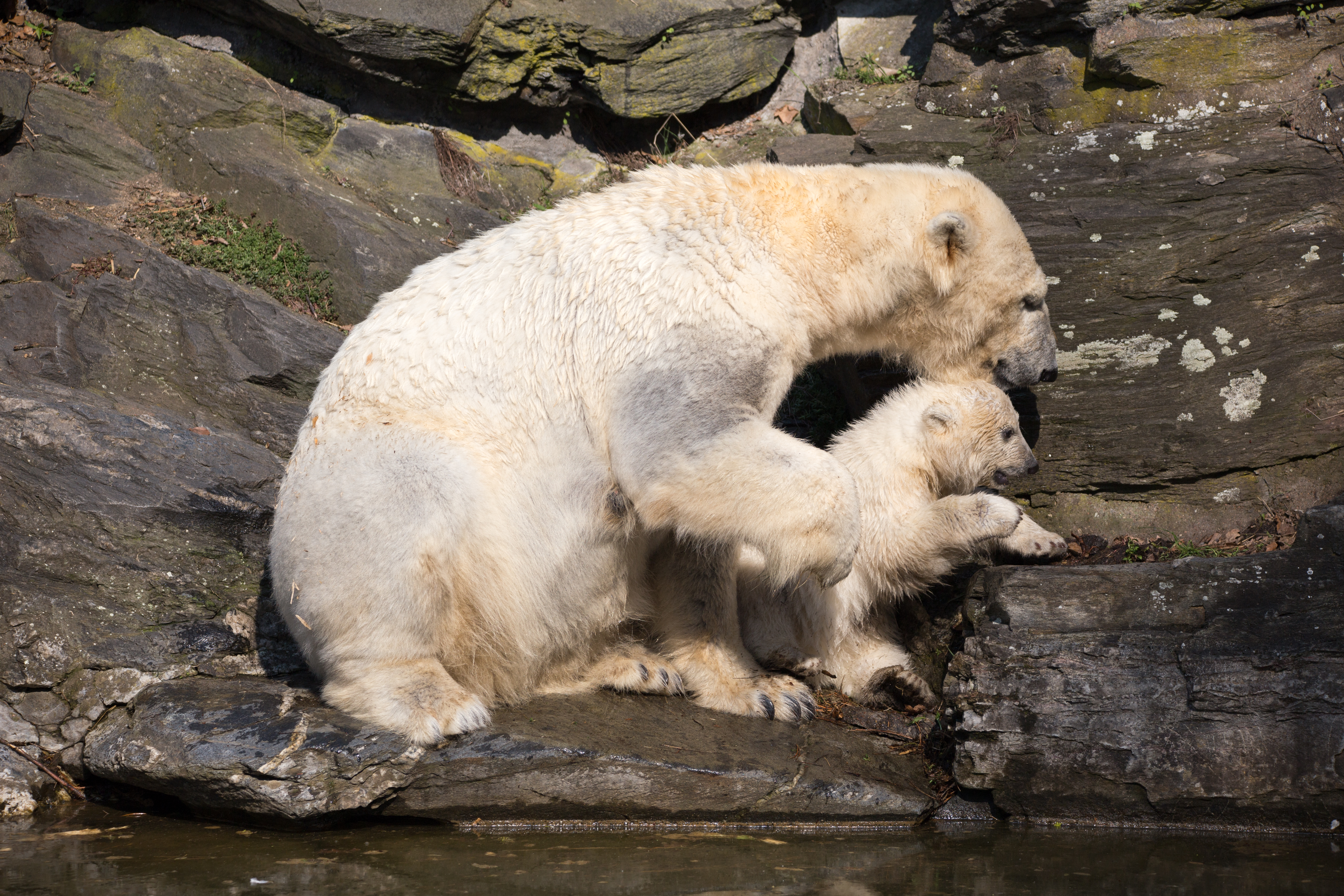 Eisbärin Hertha im Tierpark Berlin, geboren am 1. Dezember 2018.